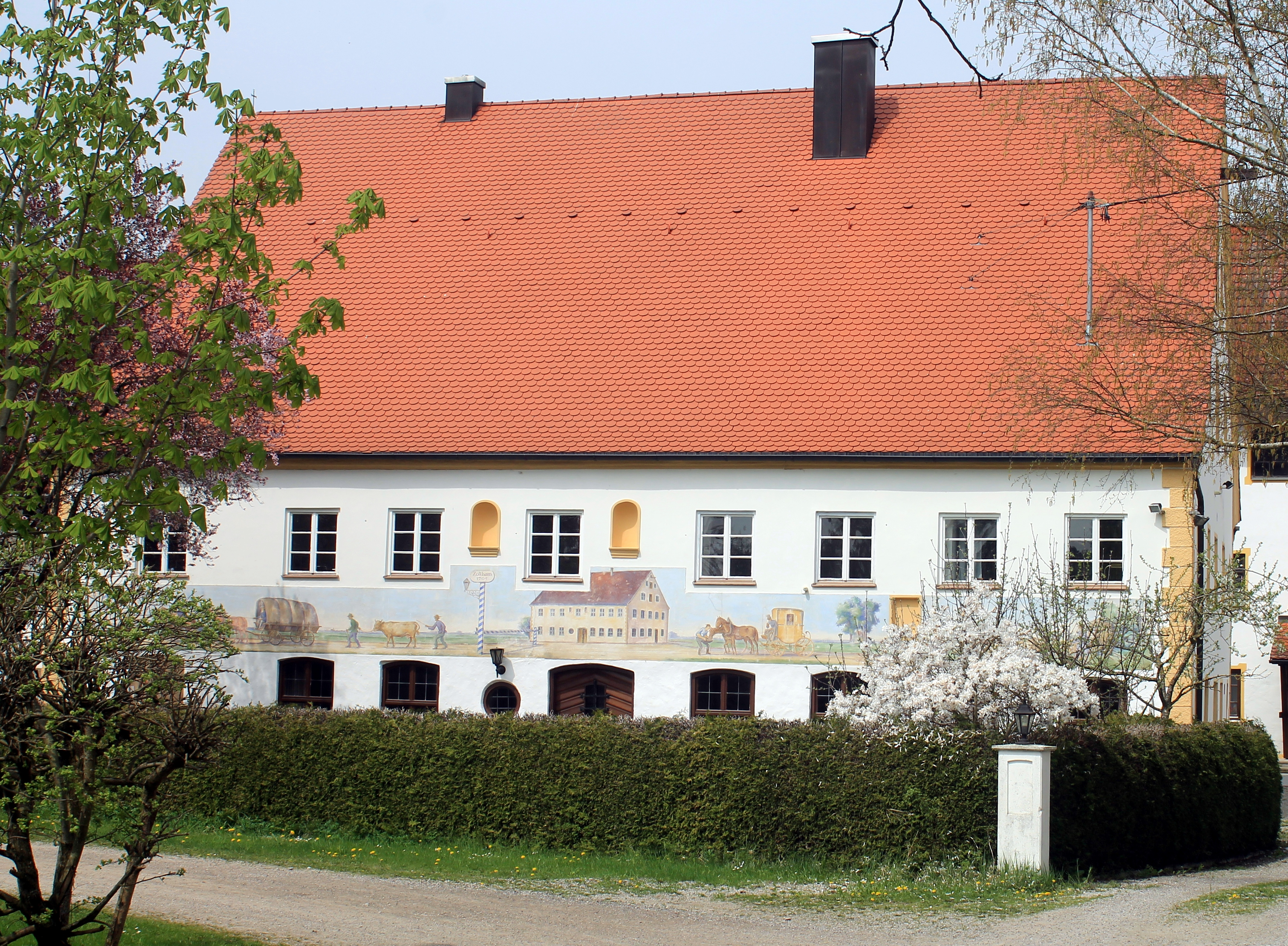 Baudenkmal Gut Zollhaus